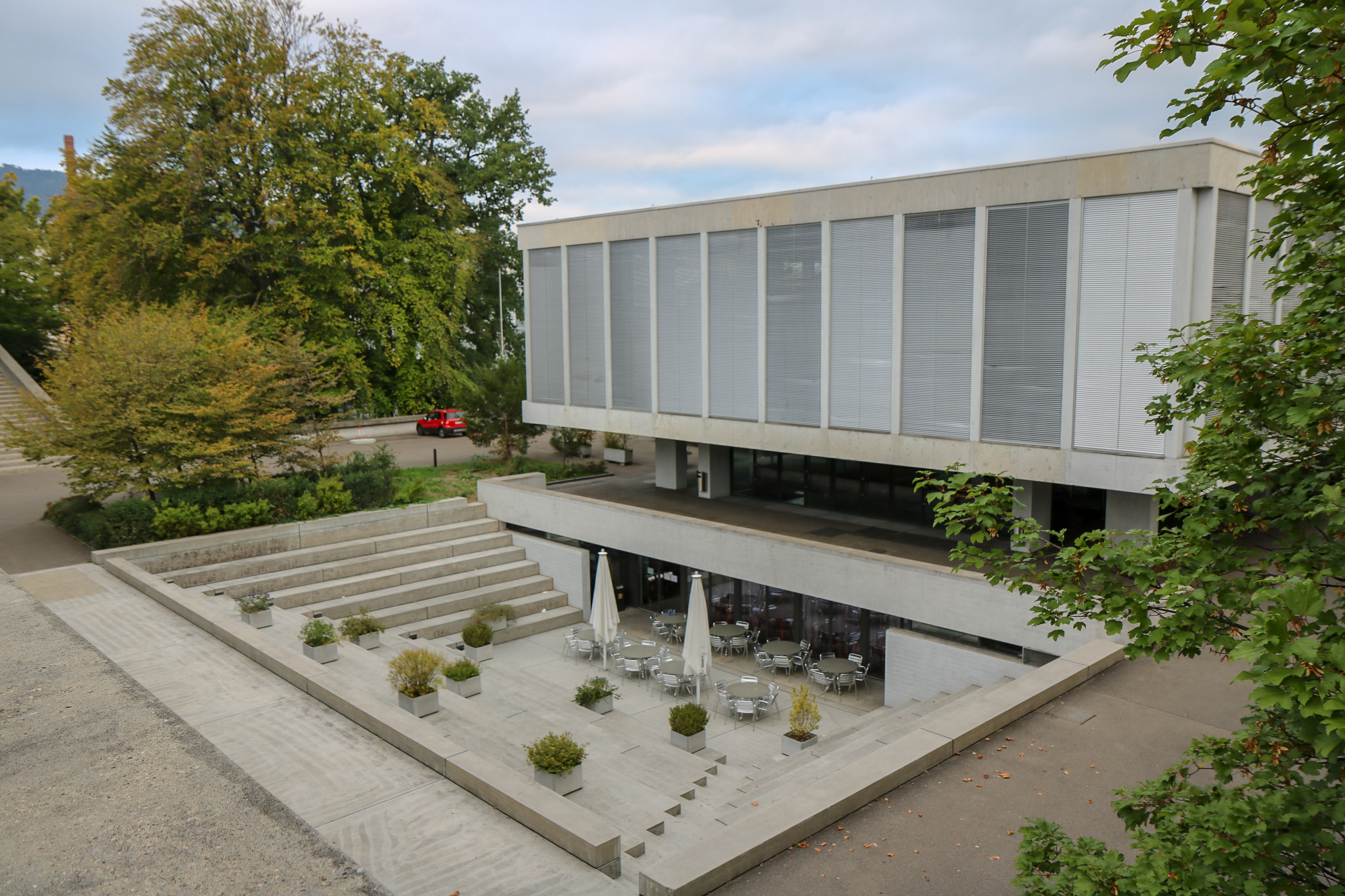 Bilder aus der Kantonsschulanlage Freudenberg-Enge 2018 - Blick auf die Aula